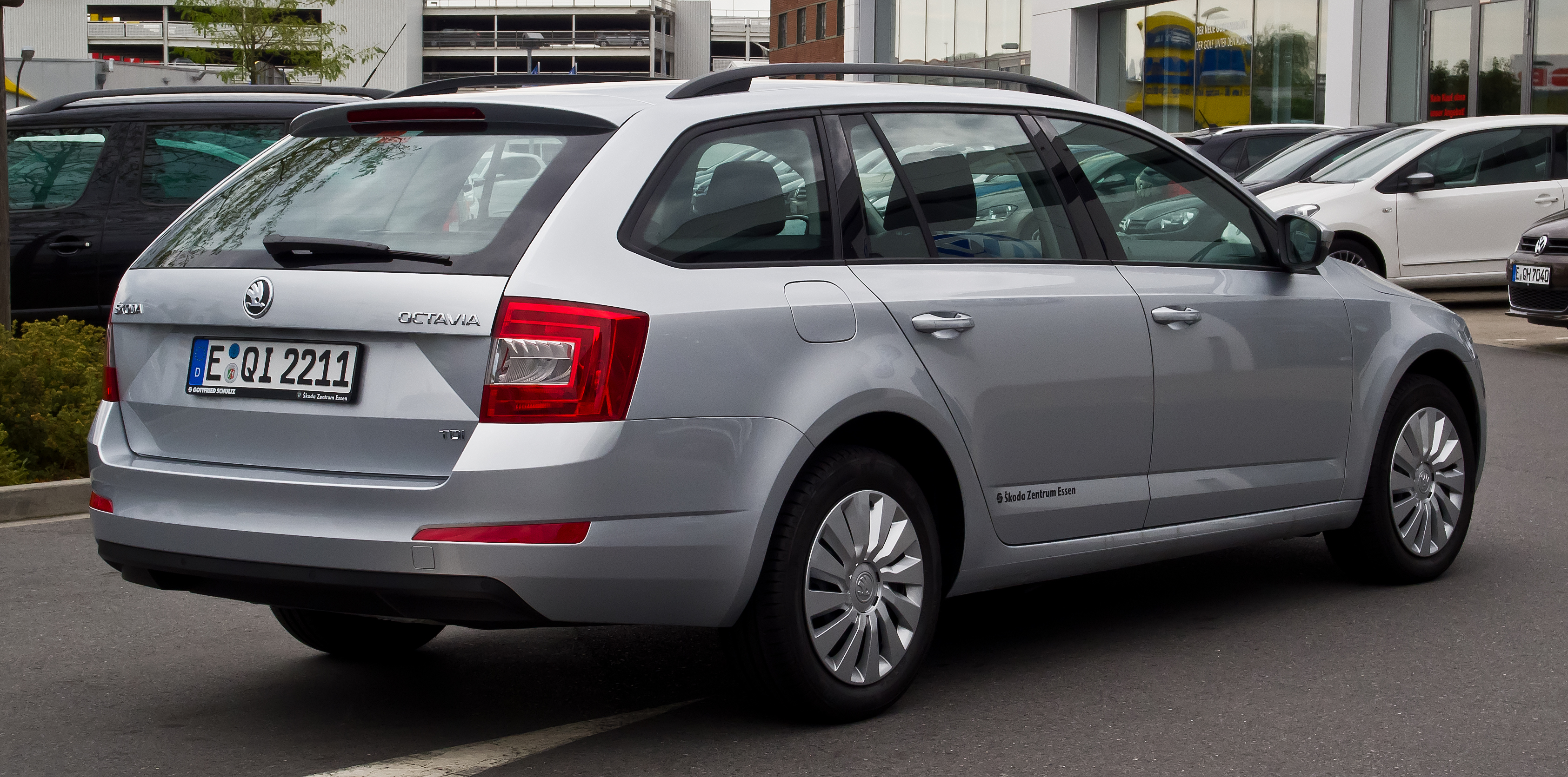 Skoda Octavia Combi 1.6 TDI Ambition (III)